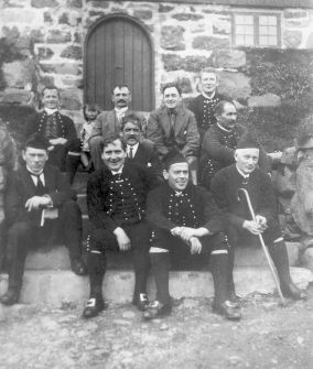 Føroyskt: Sjálvsstýrismenn vitja formannin í Kirkjubø. Menninir eru aftast frá vinstu Jacob Johs. Matras, Niclas Niclasen, Edward Mitens og Nyholm Debess. Í miðjuni sita Kristian L. Kristiansen og Jóannes Patursson, og fremst sita Johan Hendrik Poulsen, Johan Kallsoy, Símun P. Zacharissen og Gunnar Winther.